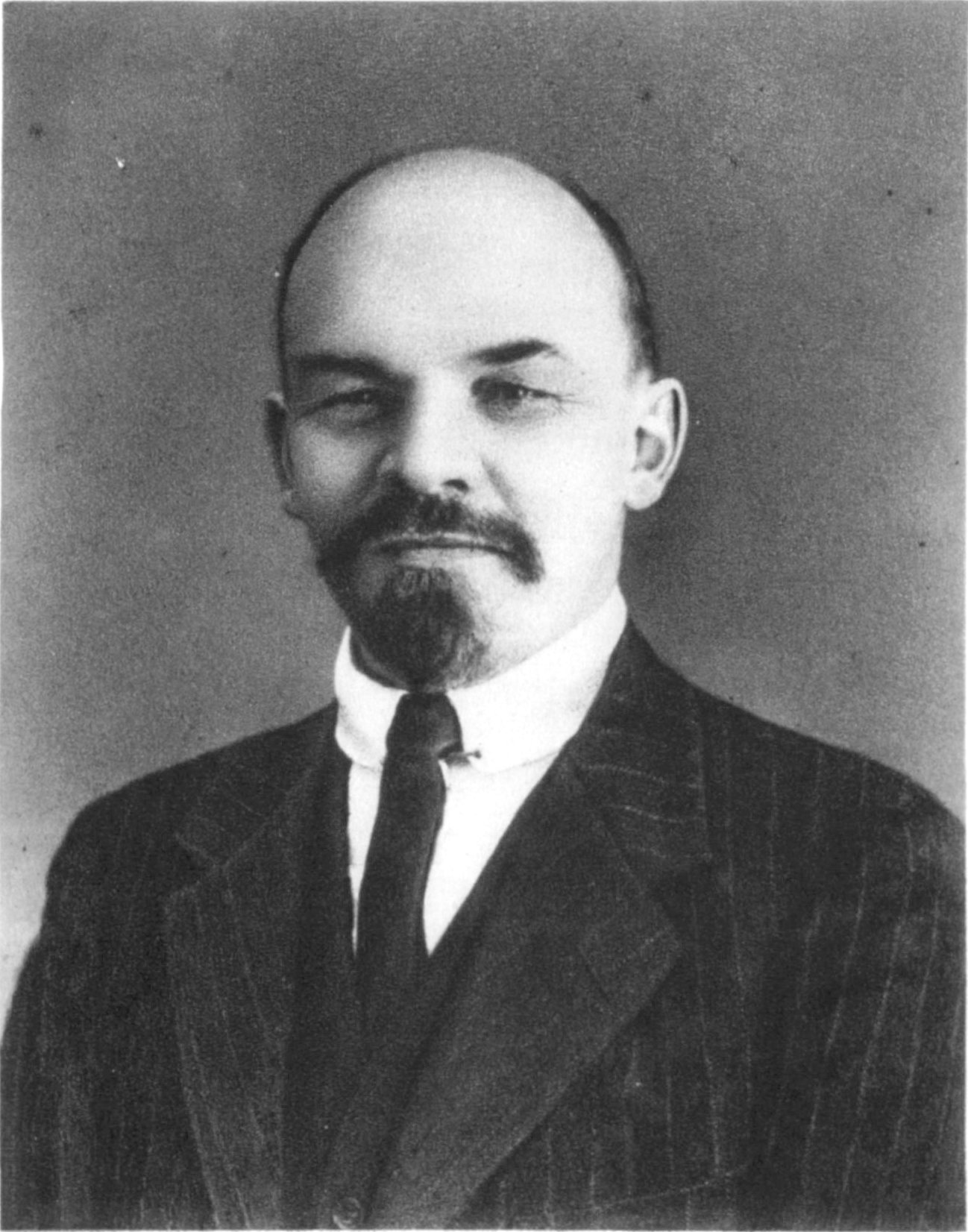 Lenin's photo from a 1930 book